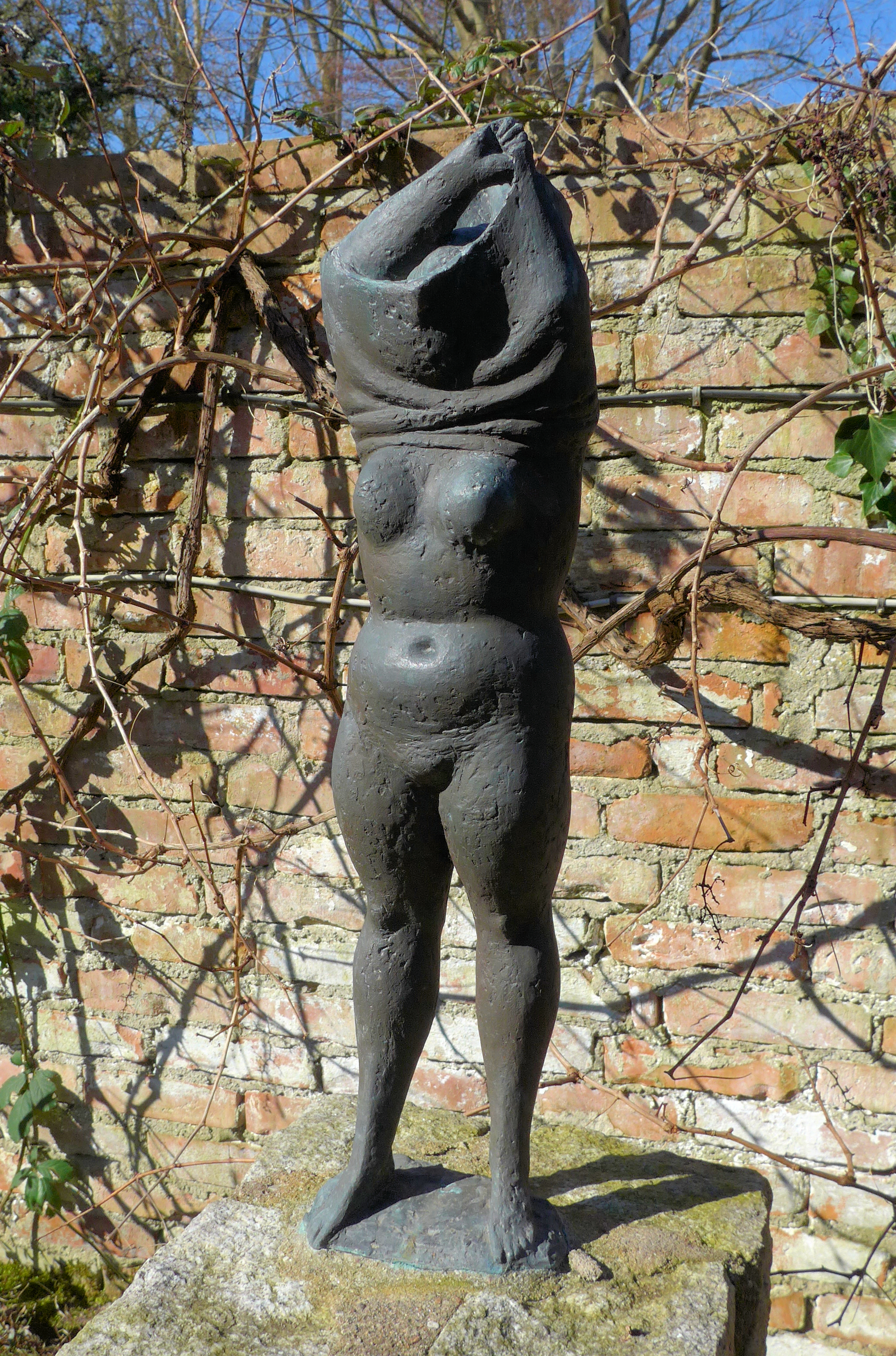 Lüttenort - Wieland Förster (Hemdausziehende II 1963)